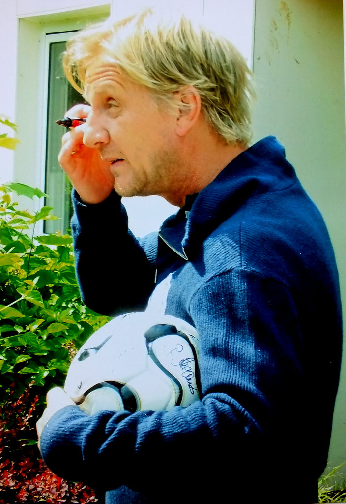 Sönke Wortmann signiert einen Ball im Stimbergstadion 2008. Anlass war ein Prominentenspiel zu seinem Film "Das Wunder von Bern".